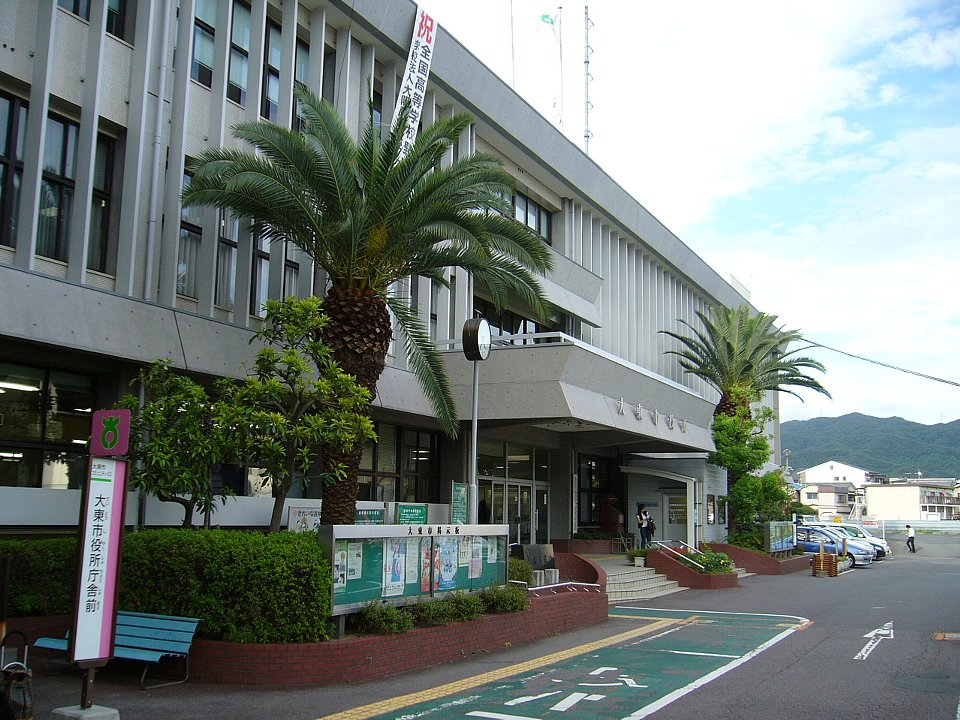 大東市役所 2006年8月 Bakkai撮影